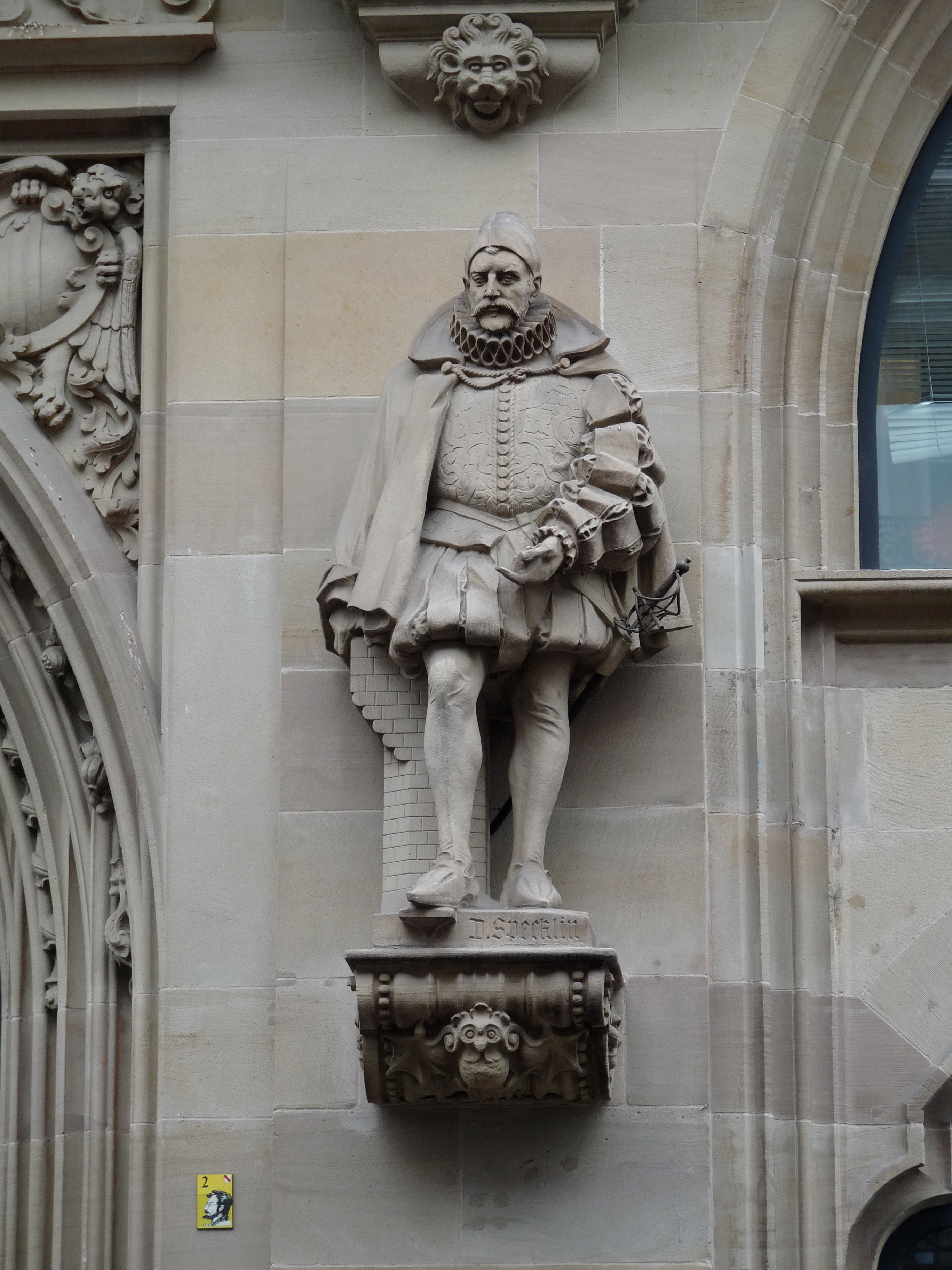 Statue de Daniel Specklin par Alfred Marzolff (1867-1936)[1], portail principal des Petites Boucheries, rue de la Haute-Montée à Strasbourg (à l'arrière de l'Aubette)